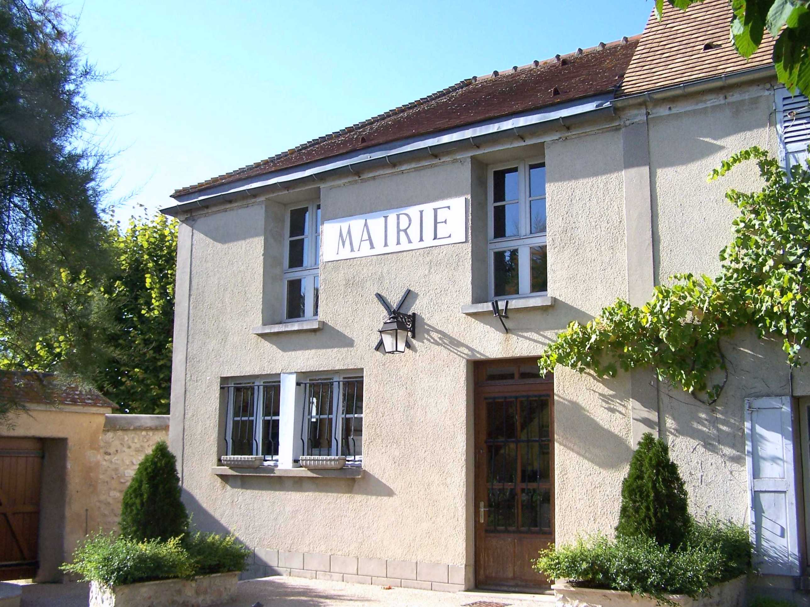 Mairie de Vicq (Yvelines, France)